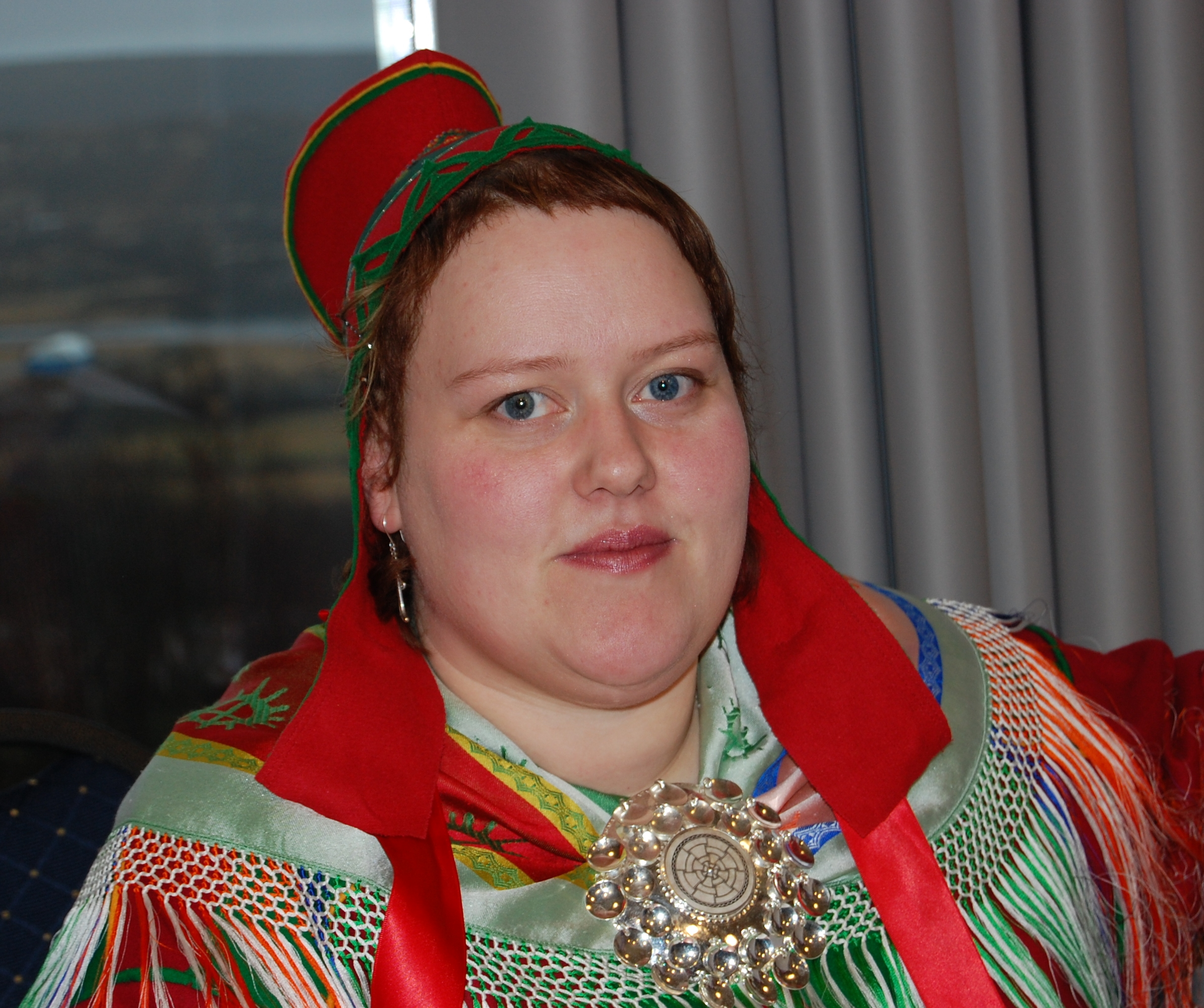 Silje Karine Muotka er 1. kandidat på NSRs liste til sametingsvalget i Nordre valgkrets. Hun er også tidligere NSR leder.